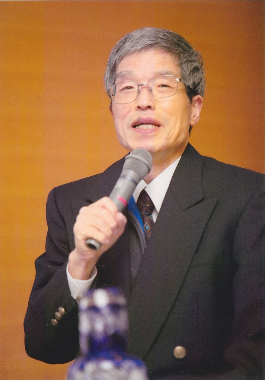 松本寿昭（まつもと としあき）